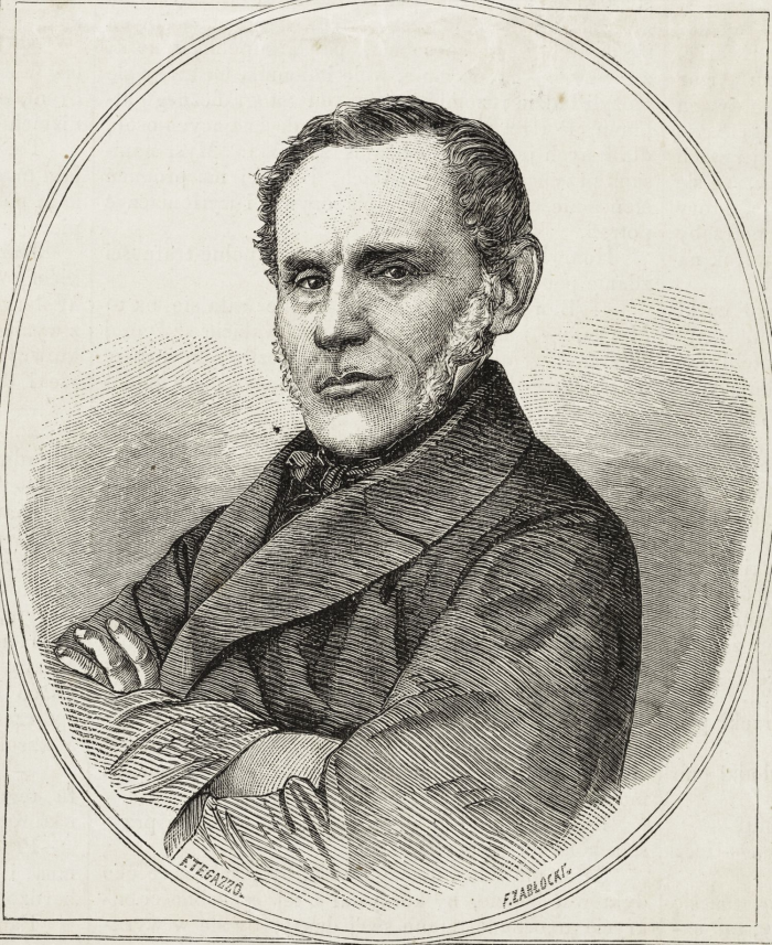 Michał Baliński (drzeworyt sztorcowy)